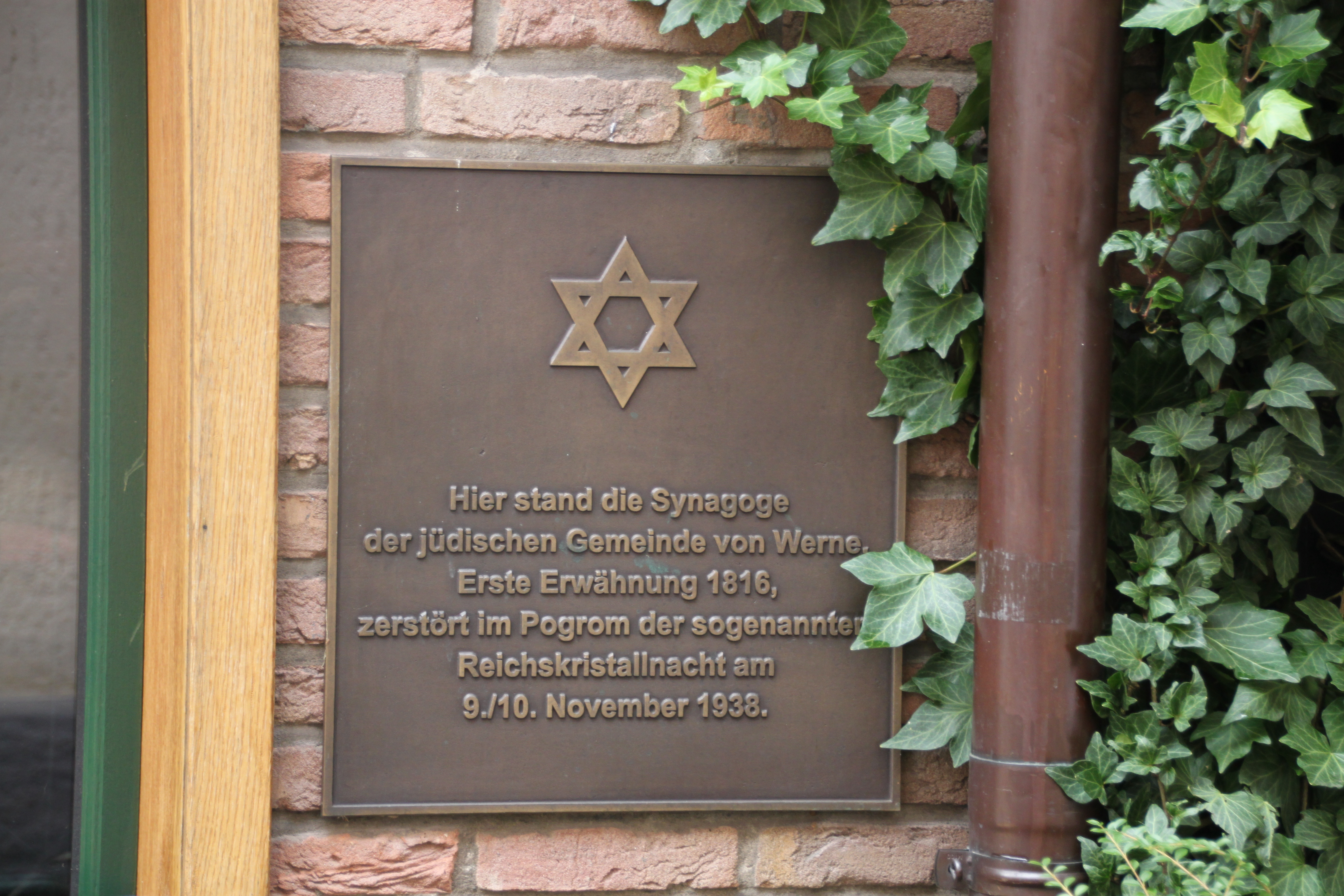 neue Gedenktafel, angebracht am ehemaligen Standort der Synagoge in Werne. Installiert im Herbst 2014.